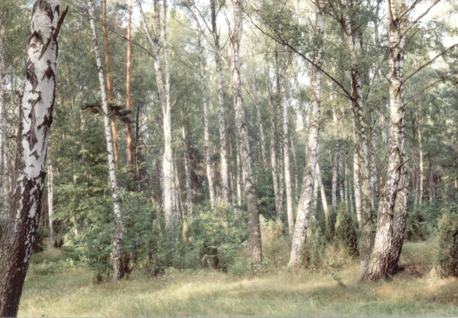 Brzozowy lasek we wsi Raducz